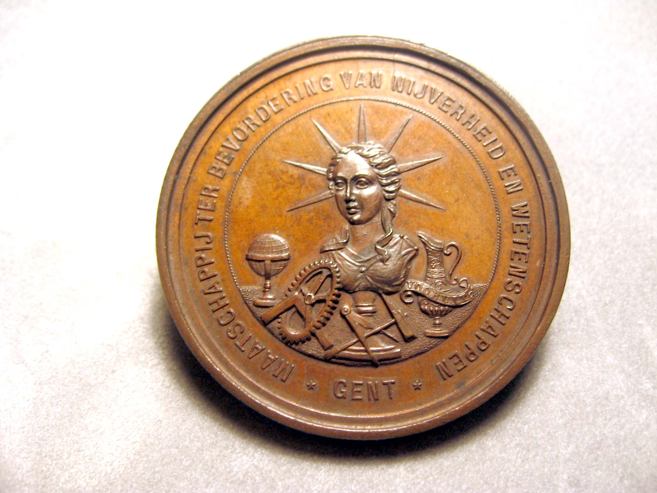 Constant Montald won de Prix de Rome (Prijs van Rome) in 1886 met zijn "Diagoras in triomf meegedragen door zijn zonen, overwinnaars van de Olympische Spelen van het Oude Griekenland". Hij ontving tevens een onderscheiding en de afgebeelde medaille van de "Maatschappij ter bevordering van Nijverheid en Wetenschappen". Deze zijde van de medaille toont de uitgever "Maatschappij ter bevordering van Nijverheid en Wetenschappen - Gent"